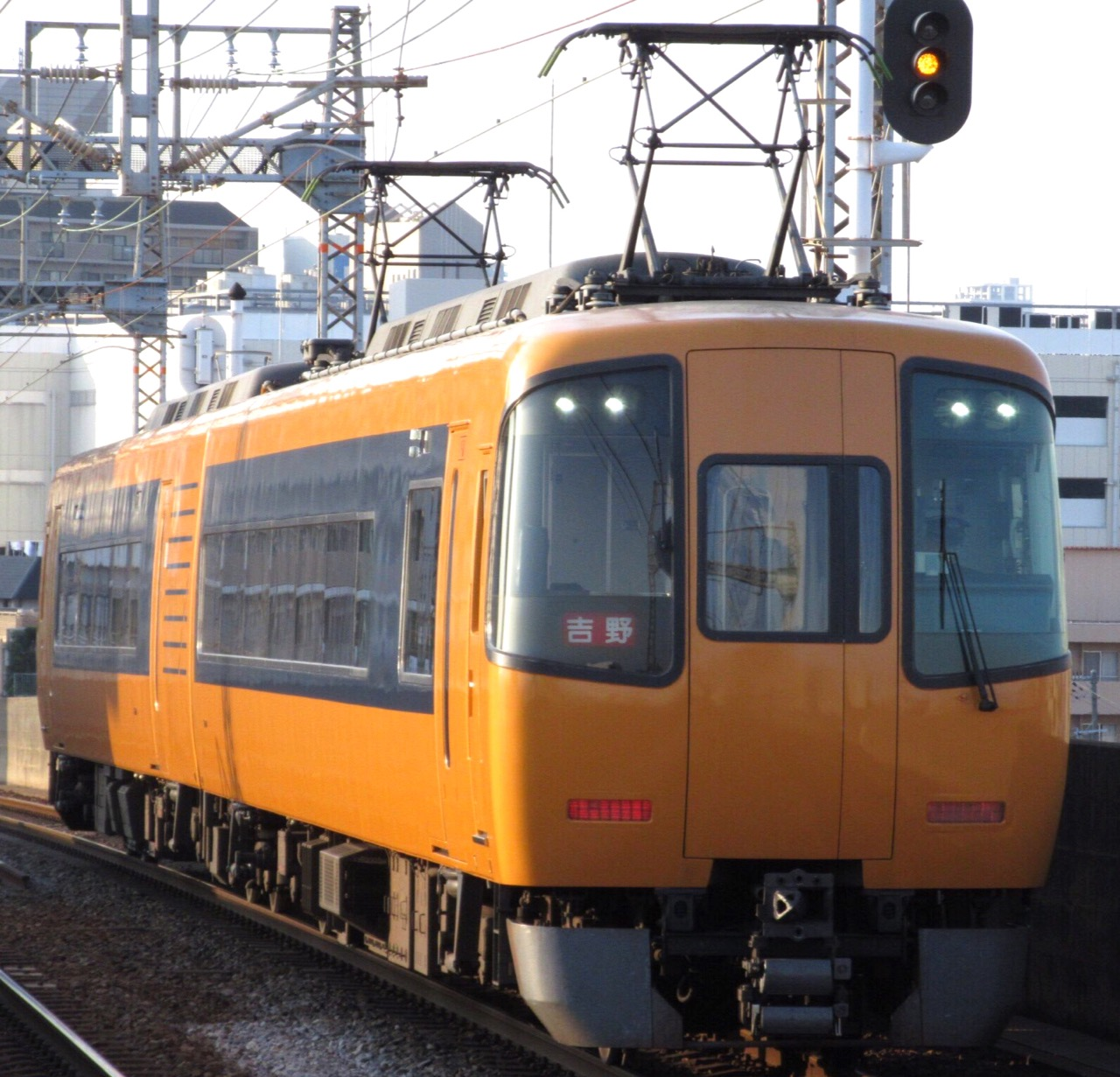 近鉄16400系 特急吉野行き